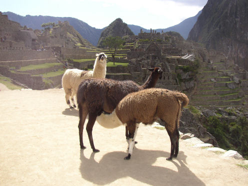 Lamas, fotografiert im Sommer 2004 von Herwig Reidlinger. GNU-FDL